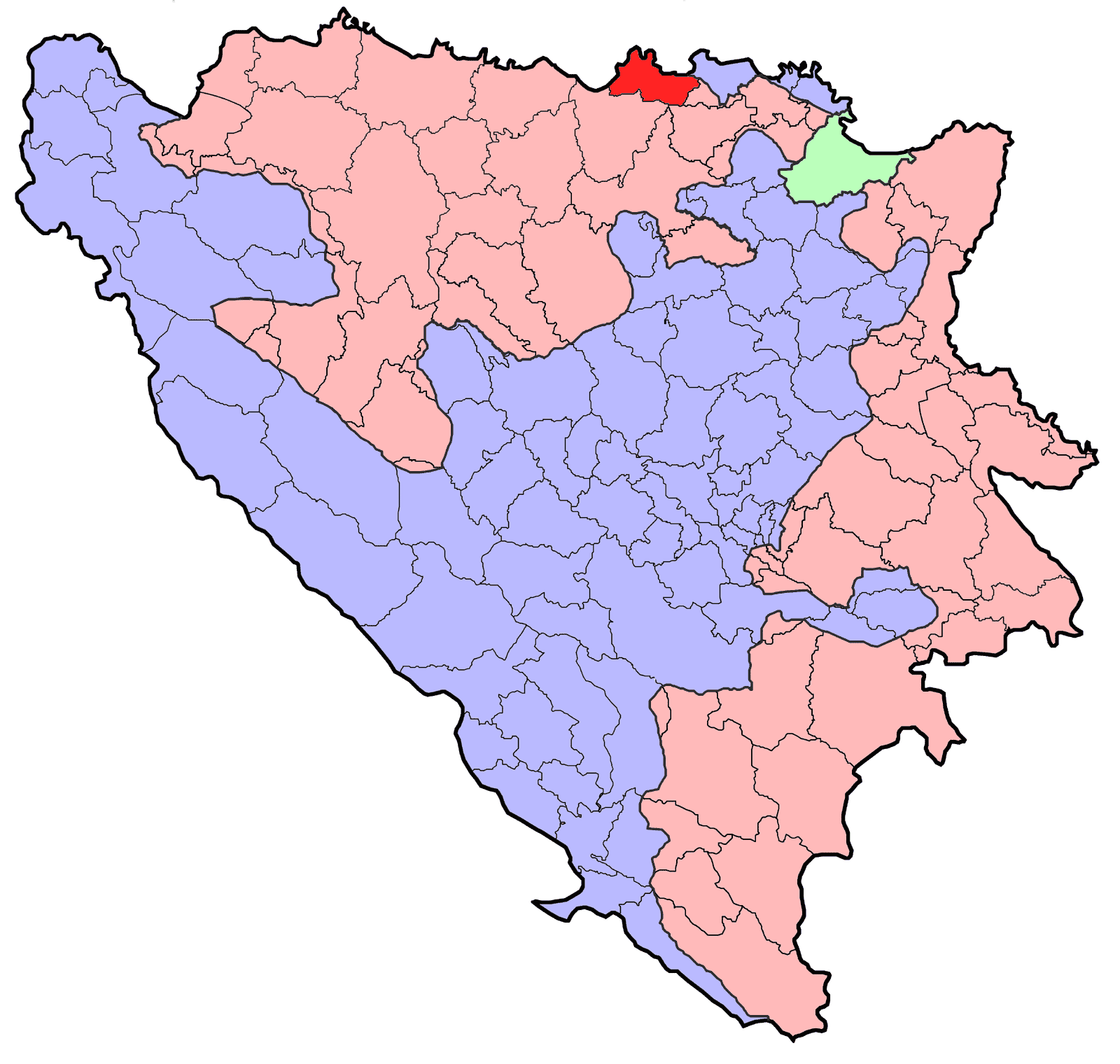 Republika Srpska (BiH) municipality